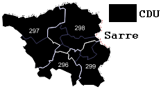 Districts de la Sarre en 2009.